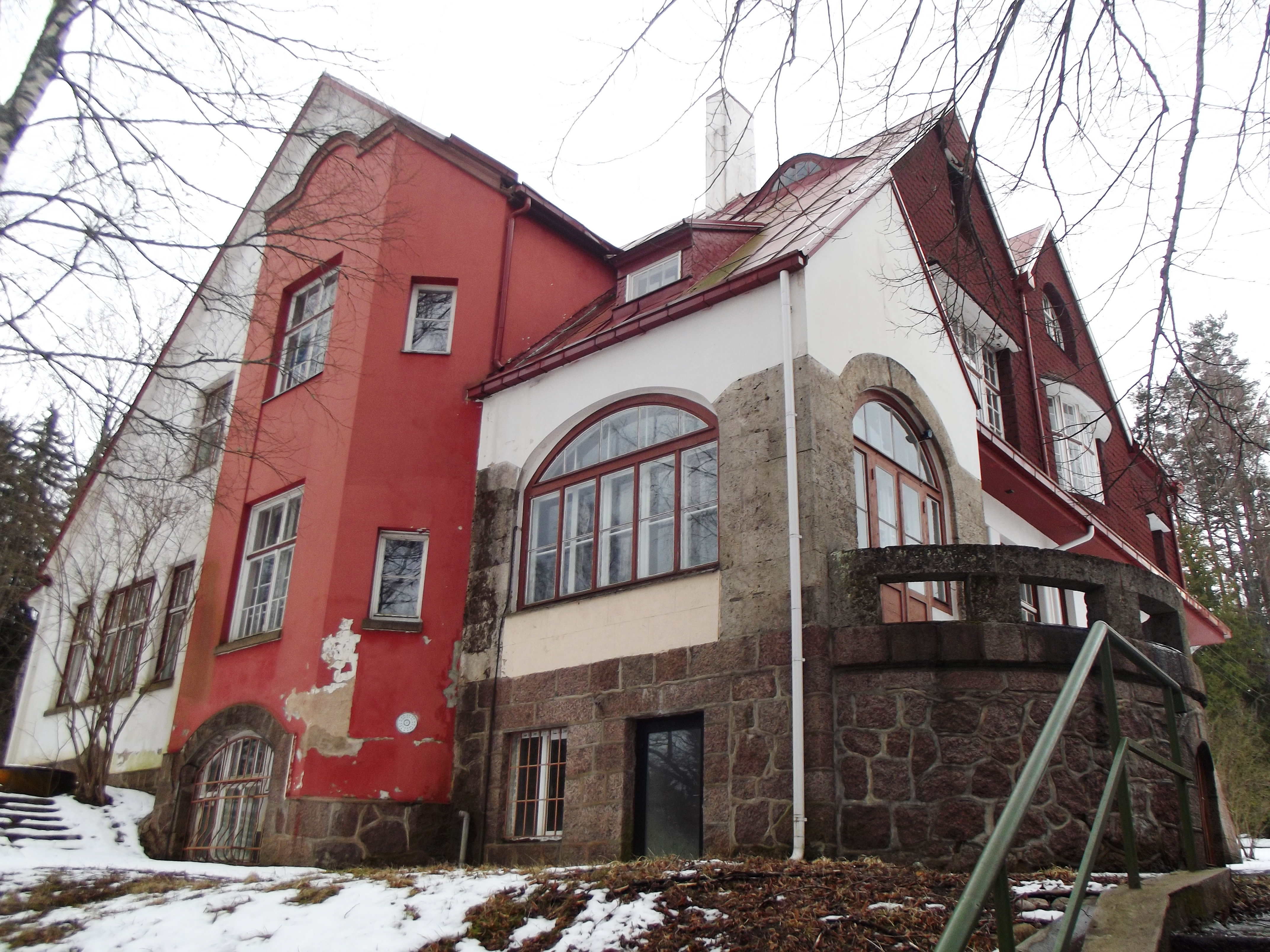 Inčukalna medību pils